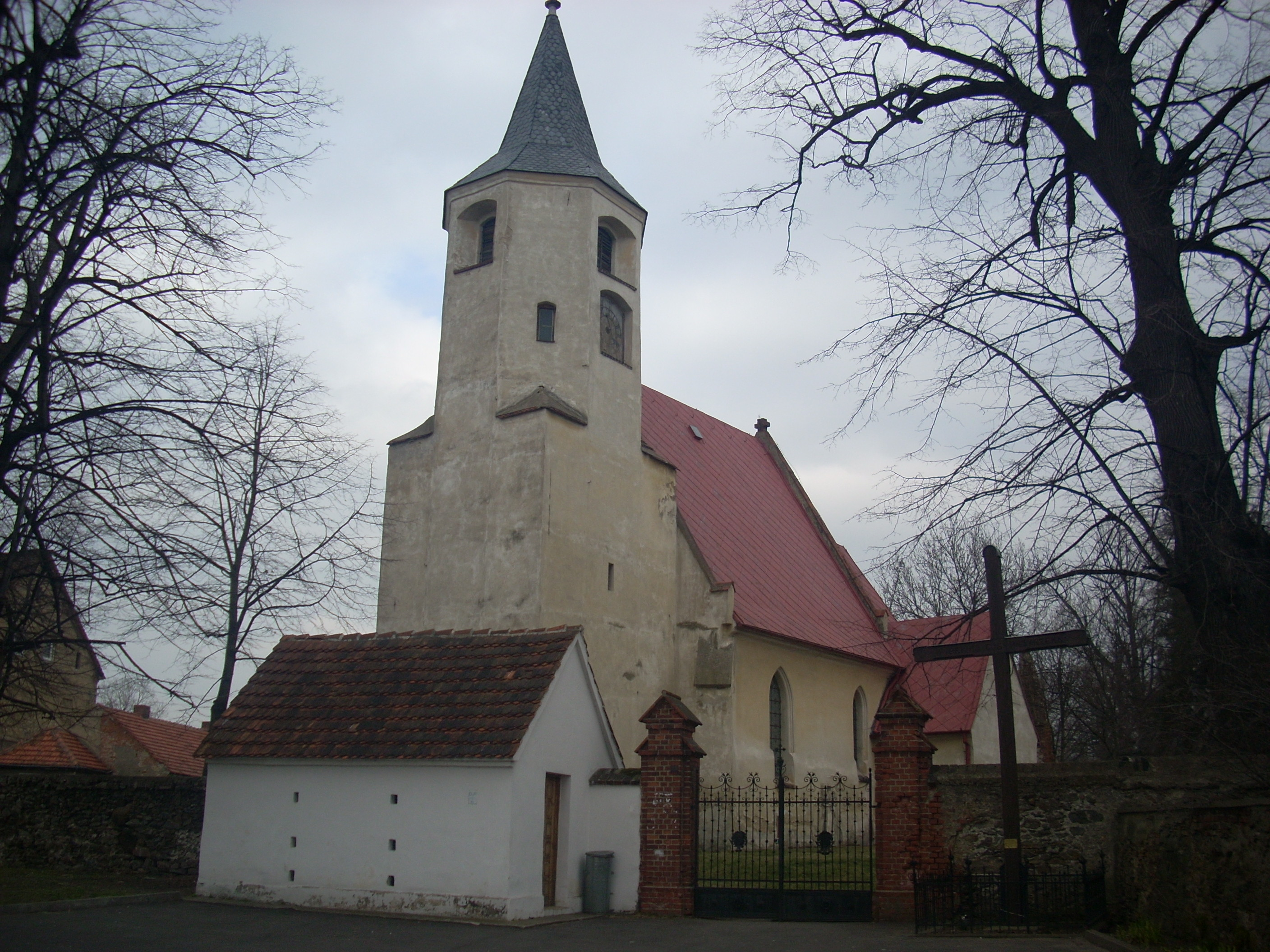 Nowizna - kościół filialny p.w. Najświętszego Serca Pana Jezusa (zabytek nr rejestr. A/1922/767/Wł)